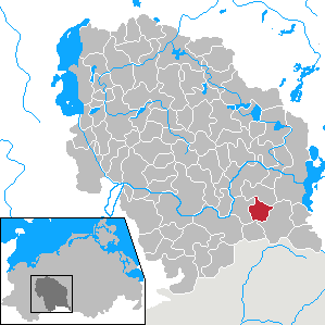 Karbow-Vietlübbe in Mecklenburg-Vorpommern - District Parchim